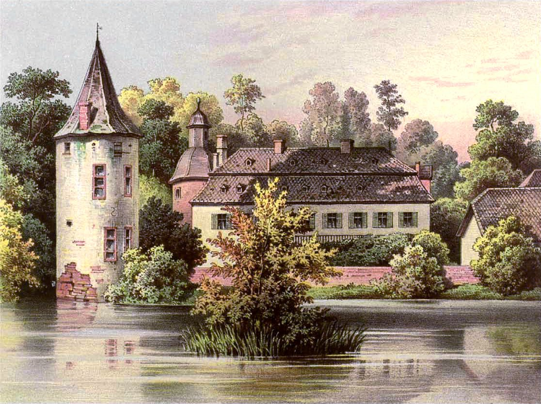 Burg Dreiborn, Kreis Schleiden, Rheinprovinz